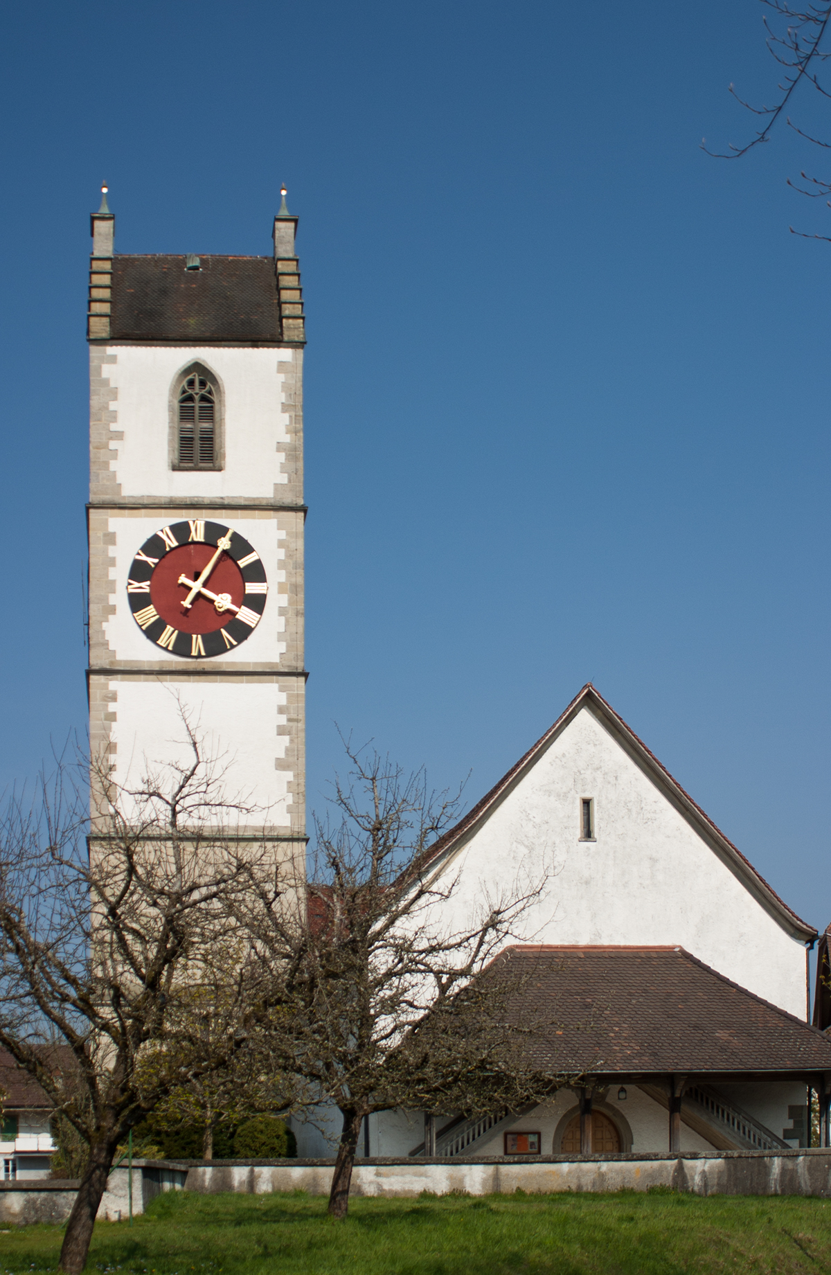 Die evangelisch-reformierte Kirche in Sumiswald